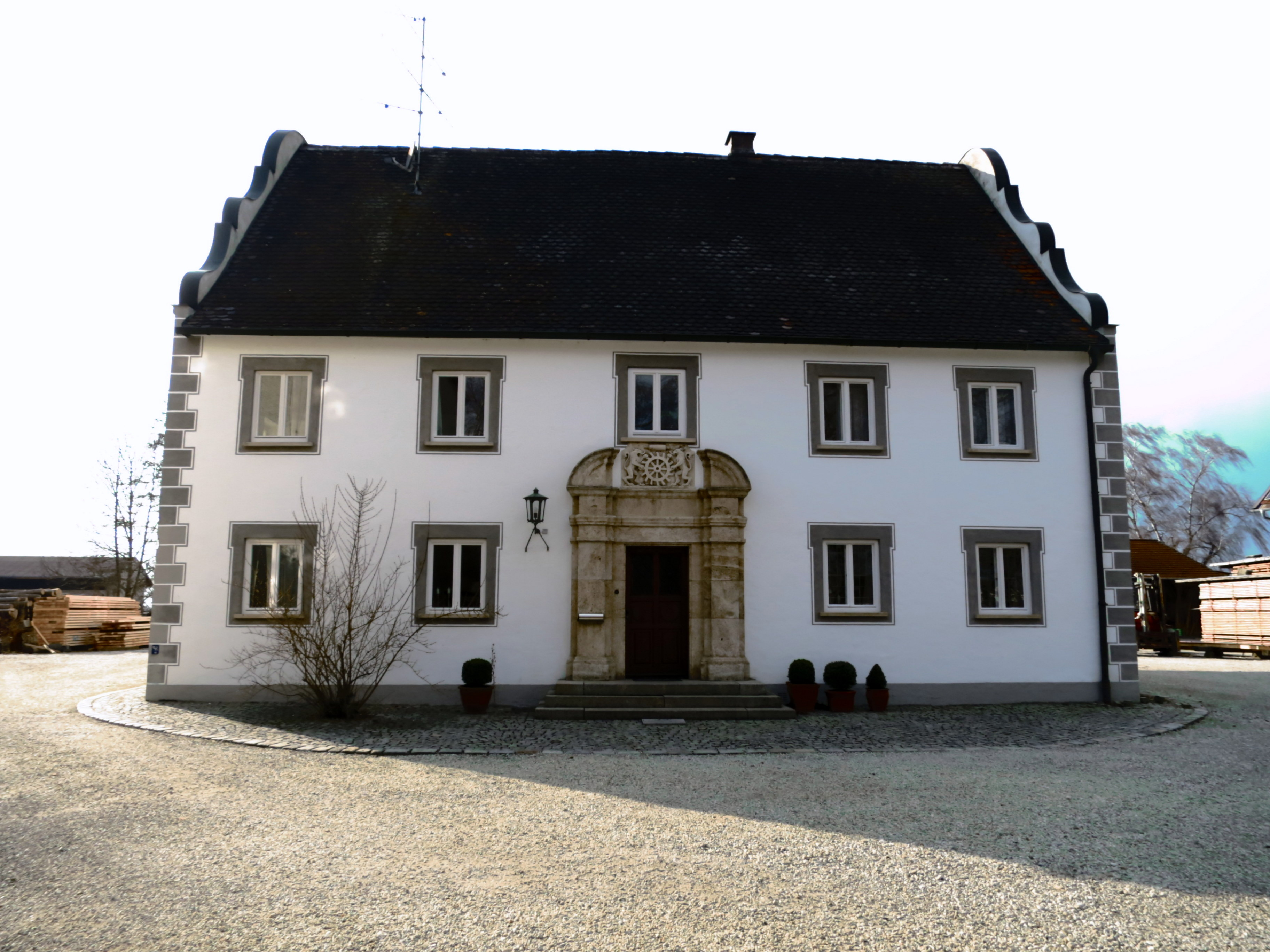 Die traditionsreiche Reckmühle an der Glonn bei Allershausen